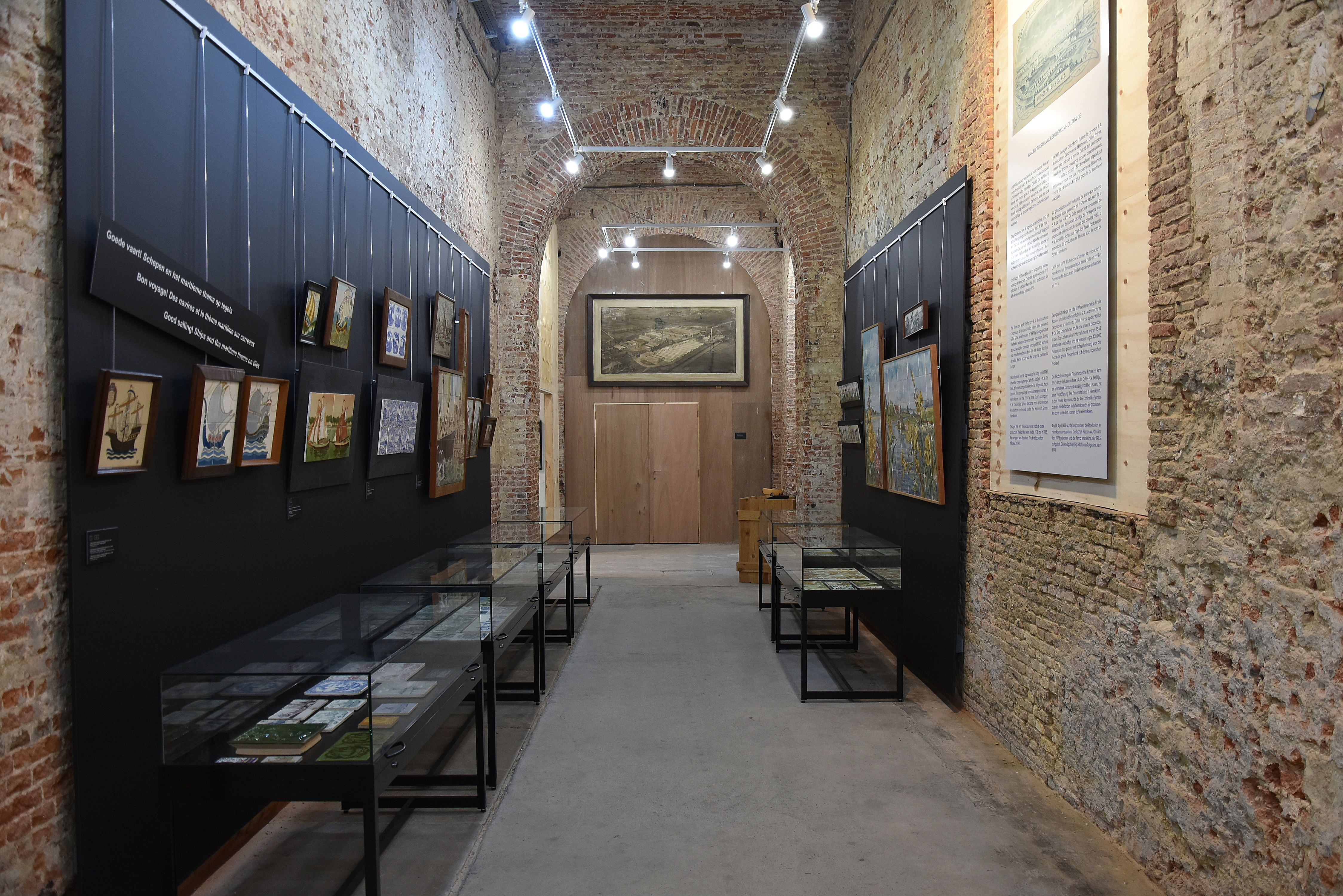 Roberto Pozzocollectie Gilliot & Roelants tegelmuseum Hemiksem 27-07-2019 This photo of immovable heritage has been taken in the Flemish Region